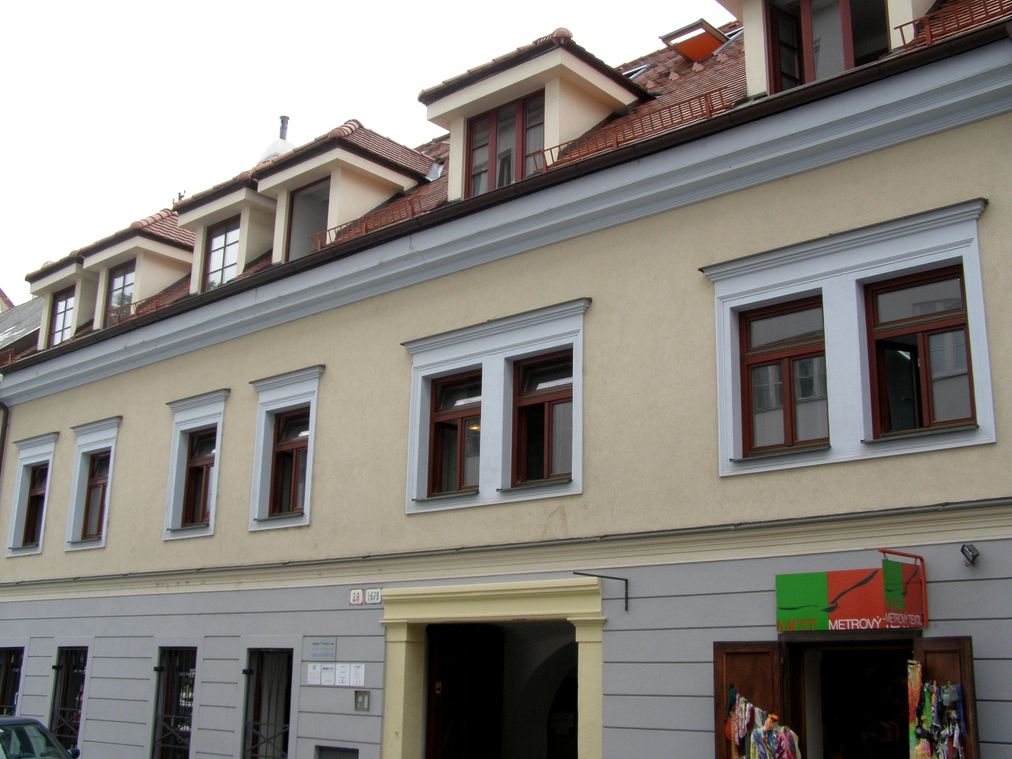 Panenská ul. č. 29 Object location48° 08′ 53.16″ N, 17° 06′ 21.24″ E